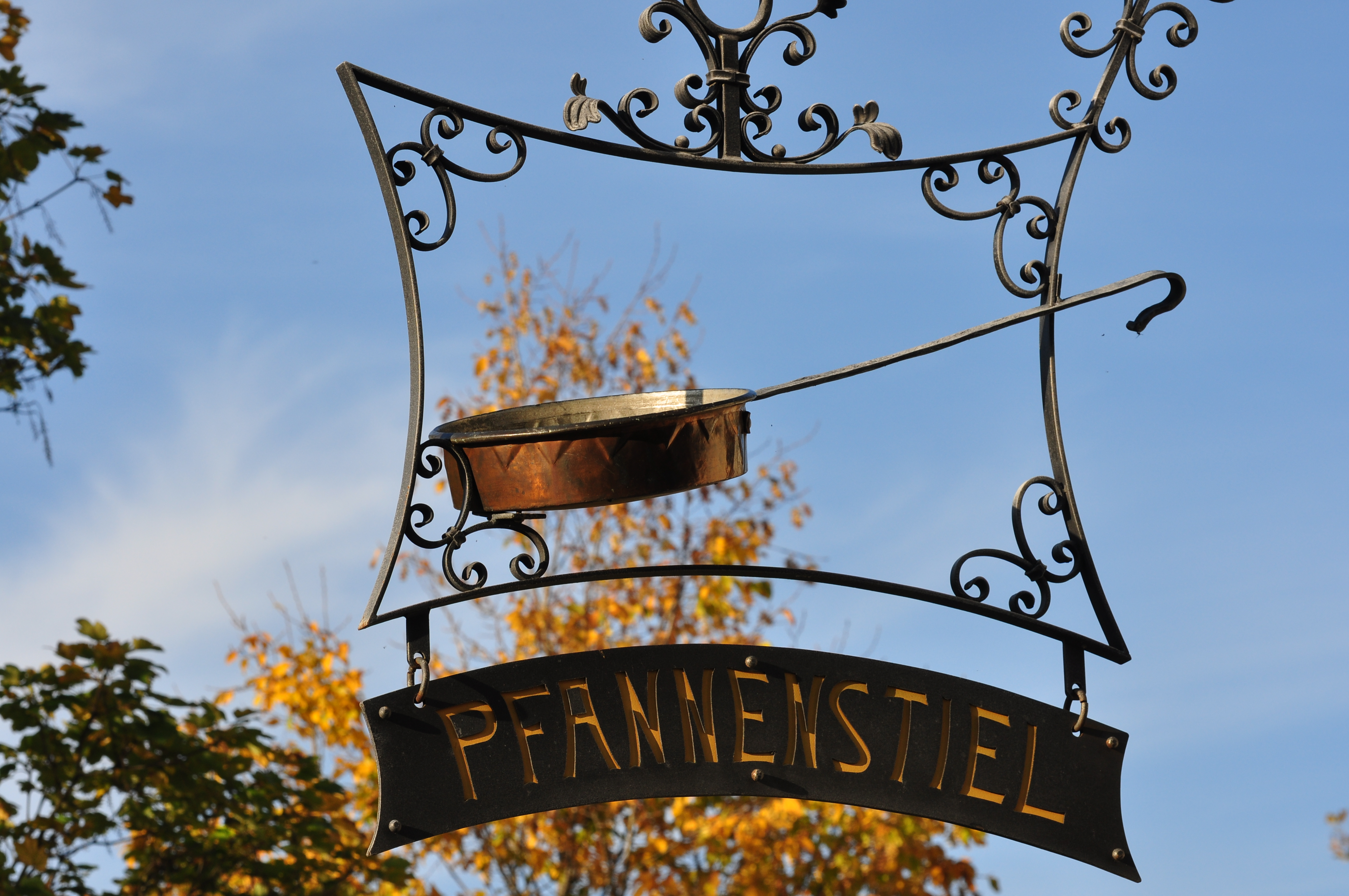 On Vorderer Pfannenstiel (Switzerland)